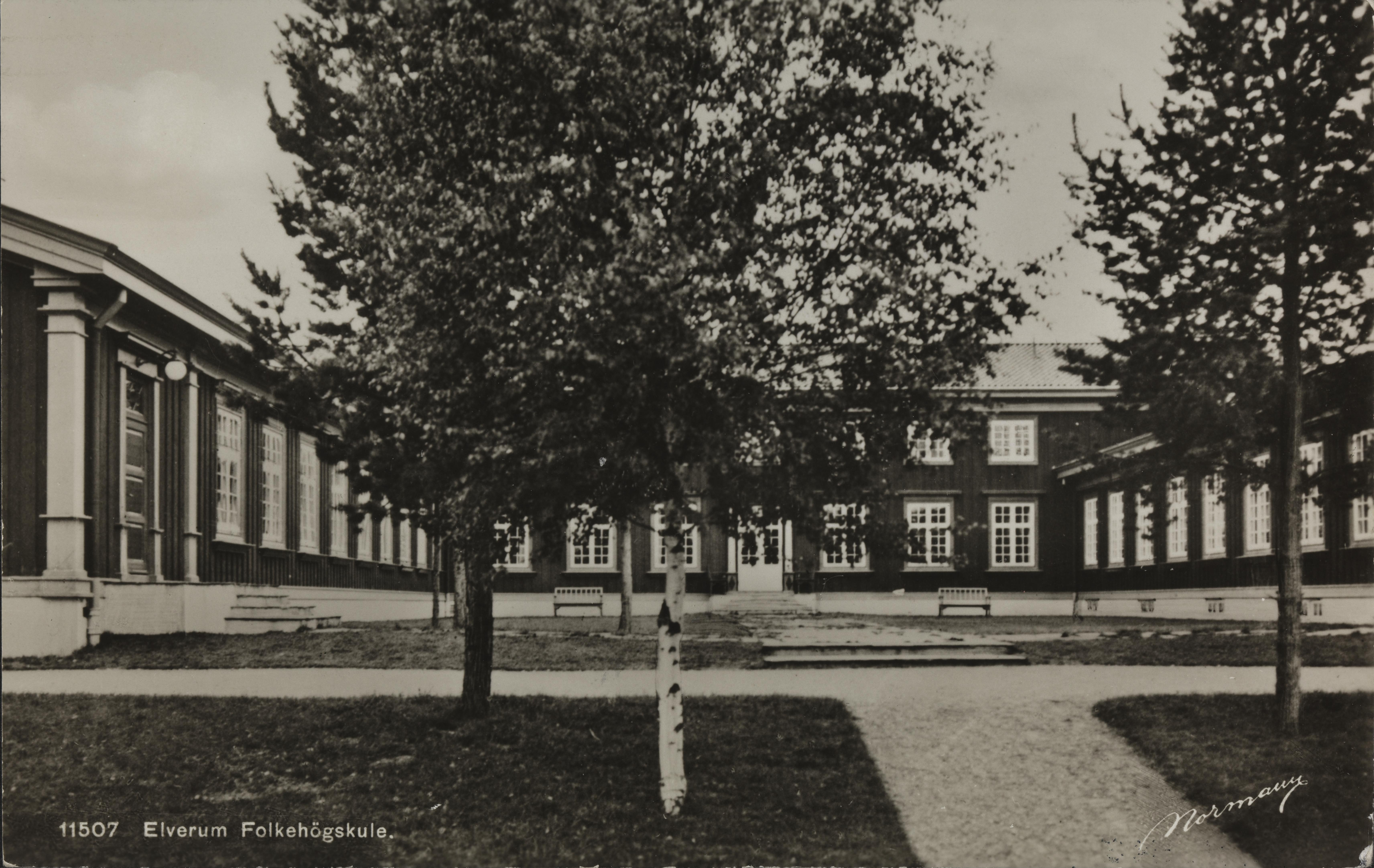 Bildet er hentet fra Nasjonalbibliotekets bildesamling Elverum folkehøgskole, Elverum, Hedmark